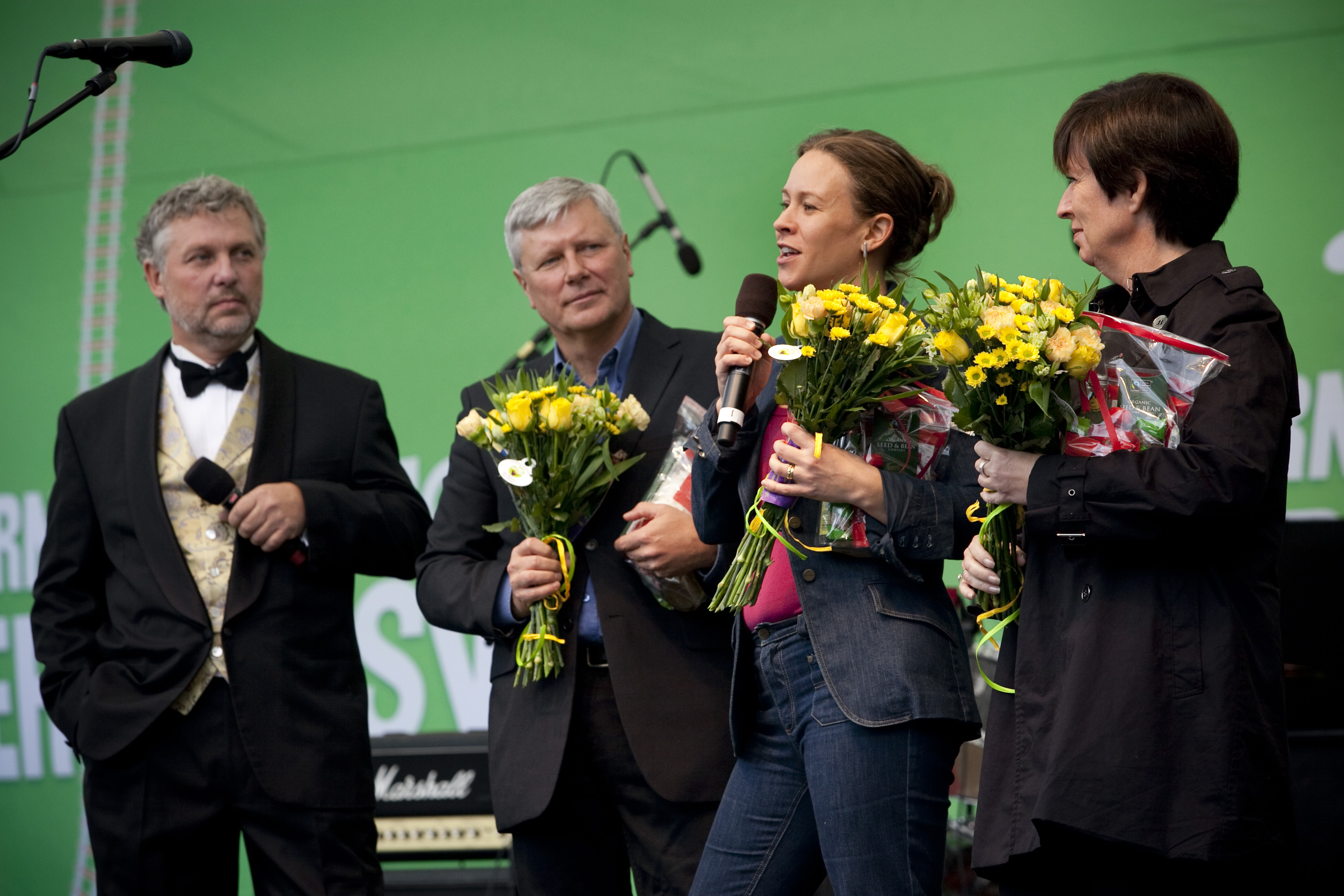 Peter Eriksson (MP) tackar Lars Ohly (V), Maria Wetterstrand (MP) och Mona Sahlin (S) efter deras tal vid Miljöpartiets Gröna dag i Kungsträdgården i Stockholm 100918.